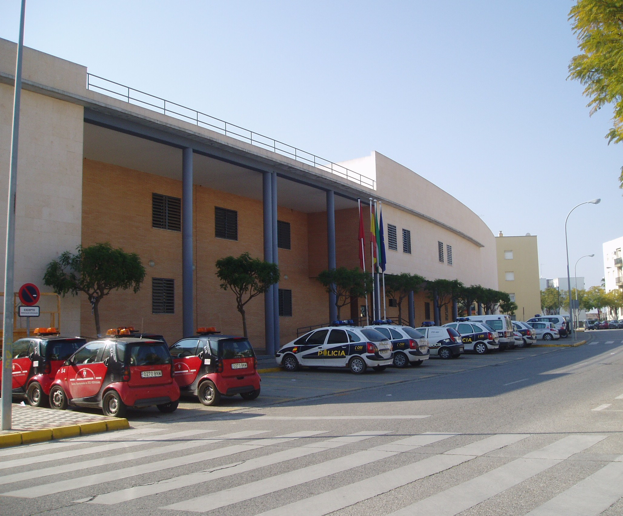 Comisaria conjunta Policía Nacional y Policía Local de Dos Hermanas. Primera de estas características en España